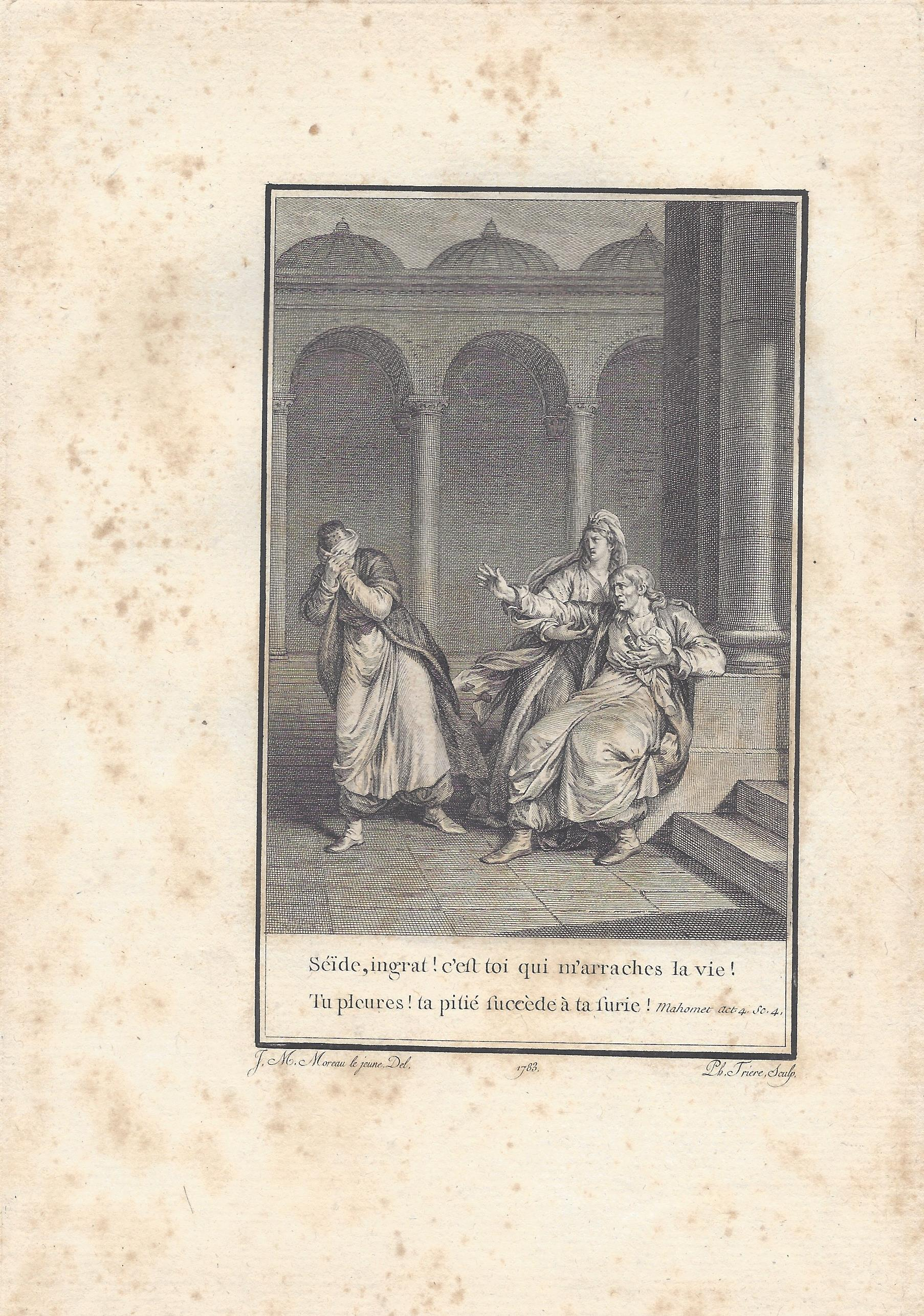 Voltaire: Mahomet Akt 4 Szene 4 Kupferstich von Philippe Trière nach Jean-Michel Moreau